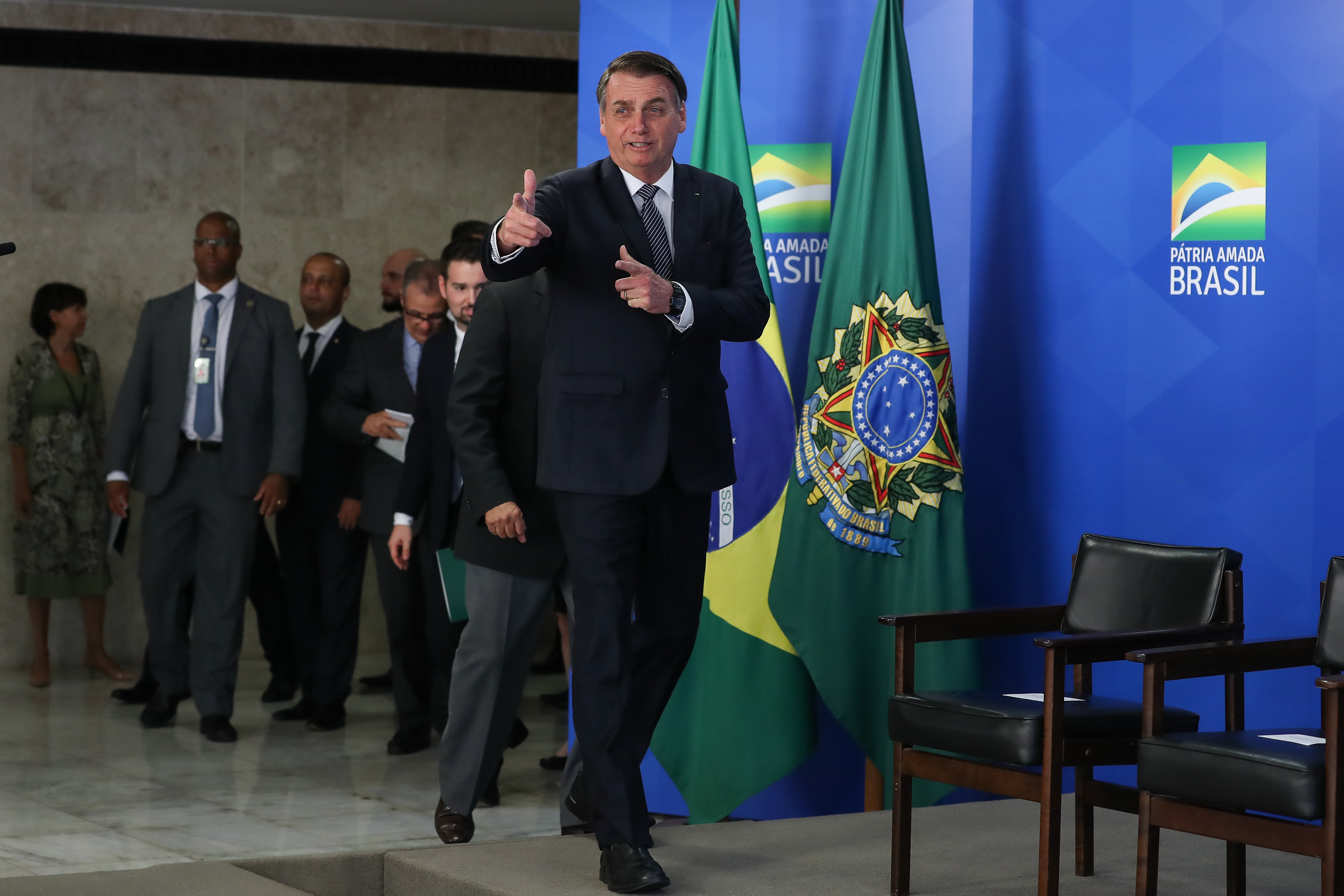 (Brasília - DF, 25/04/2019) Presidente da República Jair Bolsonaro chega ao local da solenidade. Foto: Marcos Corrêa/PR